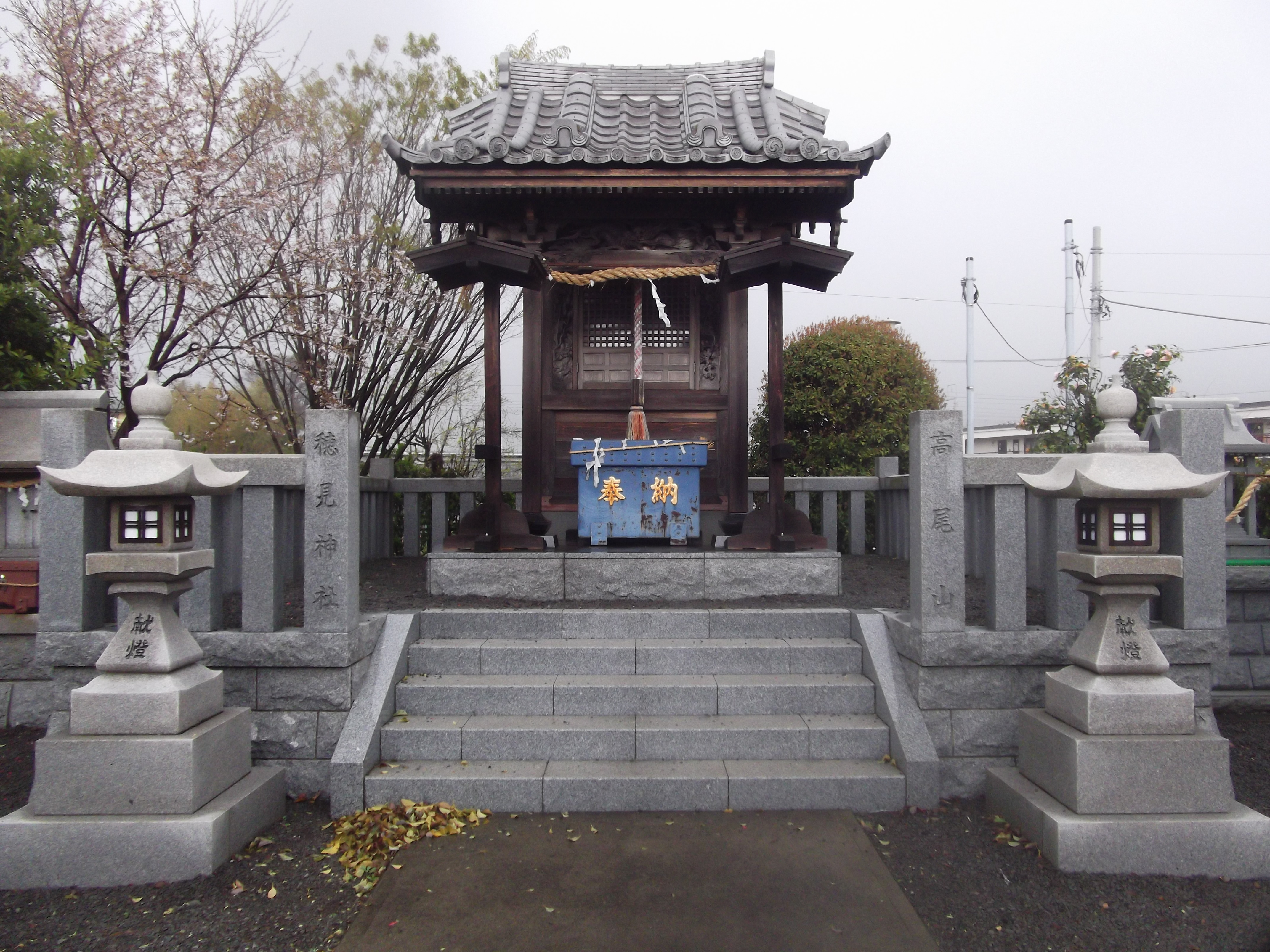 静岡県沼津市の、高尾山穂見神社。